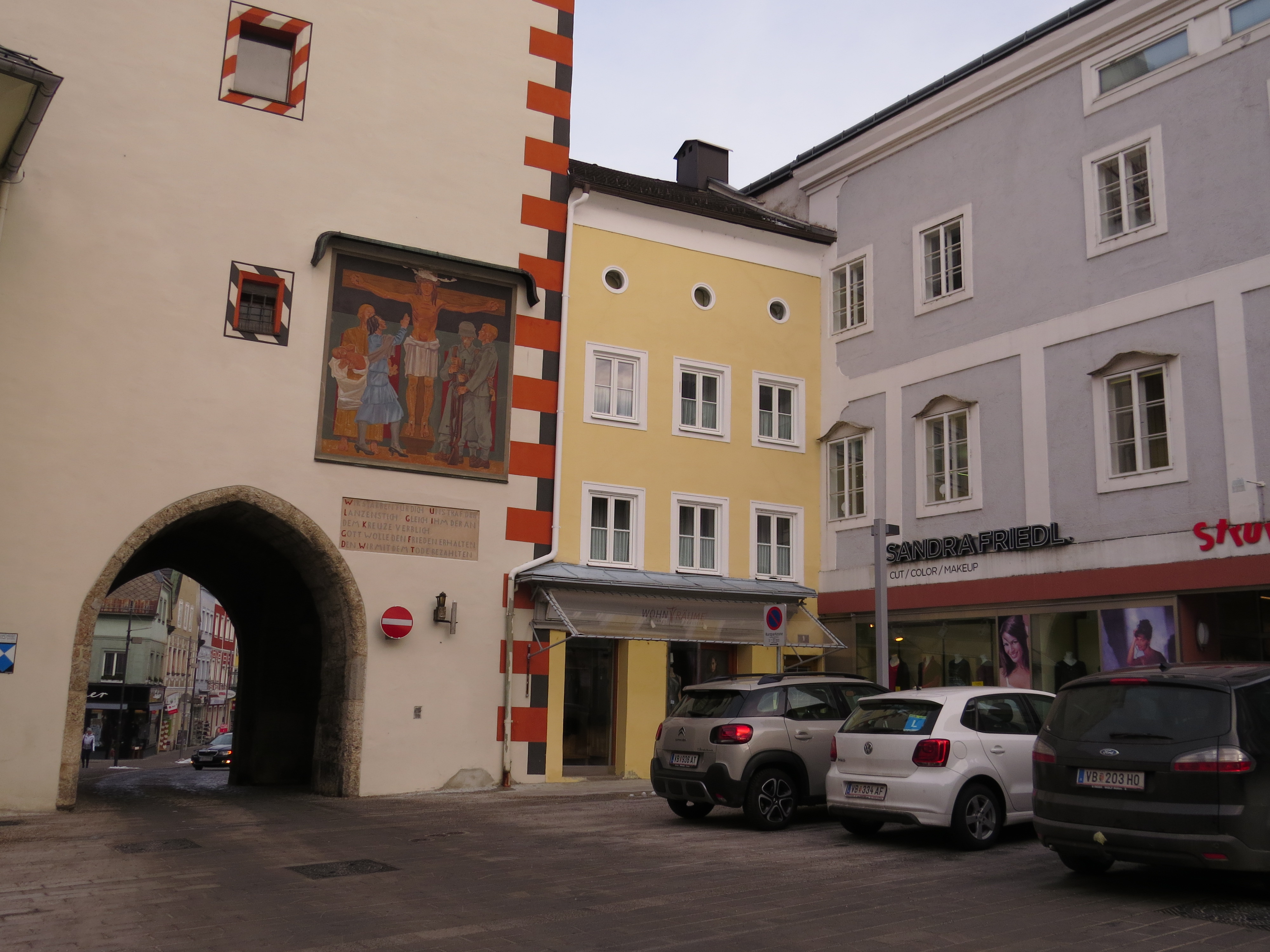 Wohn- und Geschäftshaus